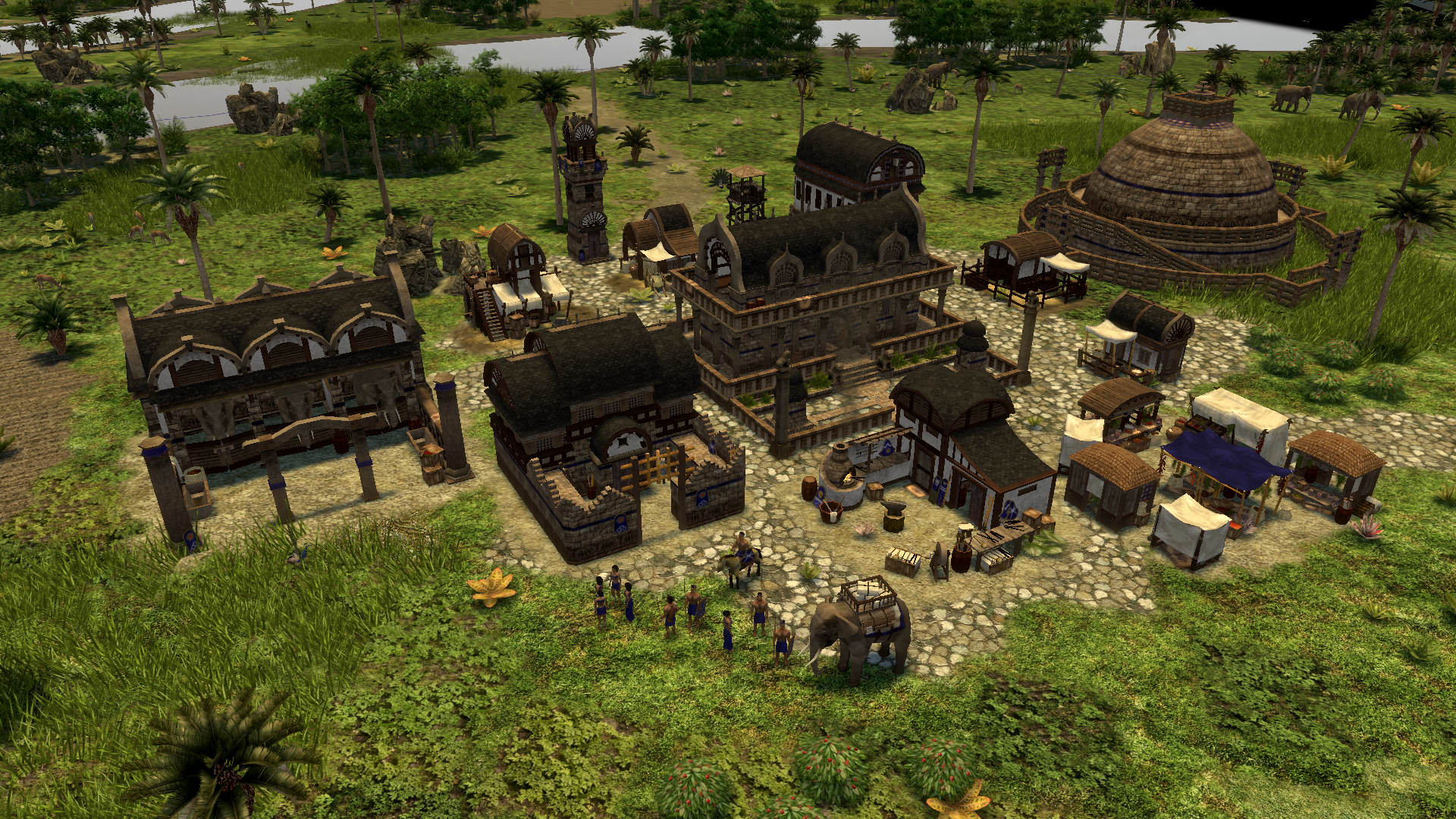 Mauryaner